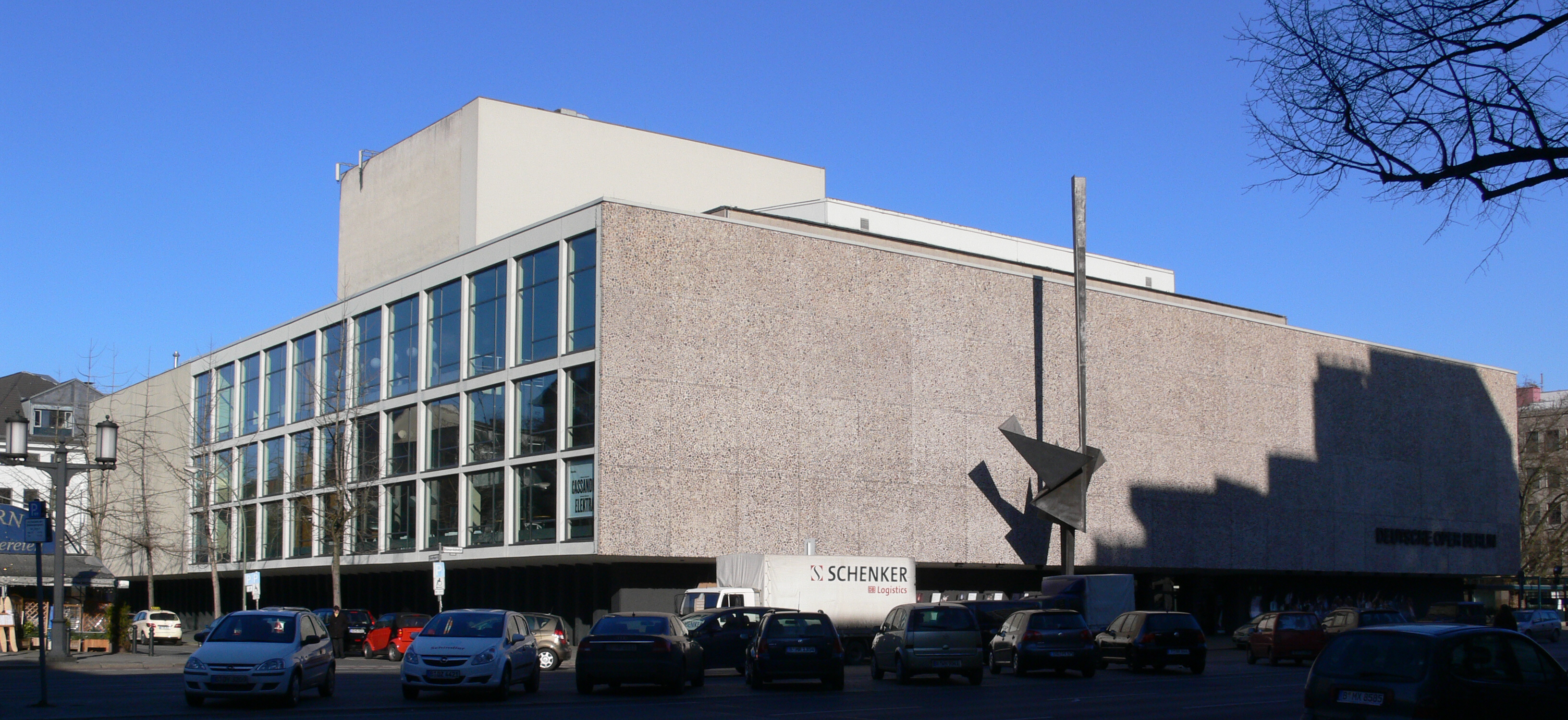 Deutsche Oper Berlin Bismarckstraße / Richard-Wagner-Straße